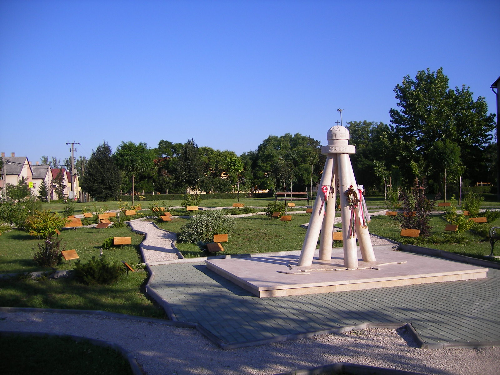 Nagyigmánd - Nagy-Magyarország-emlékmű